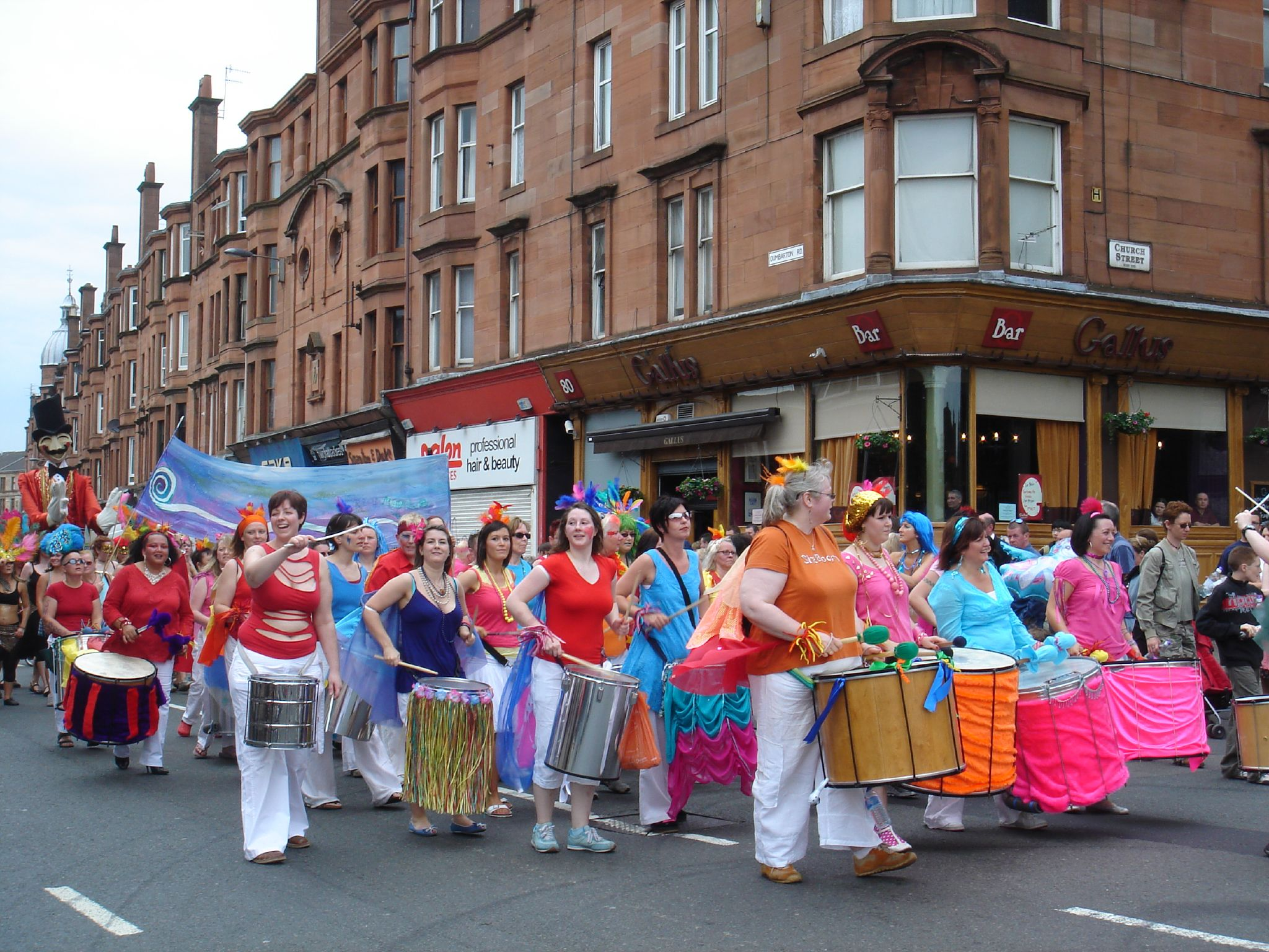 Bundzinieki festivālā "West End".